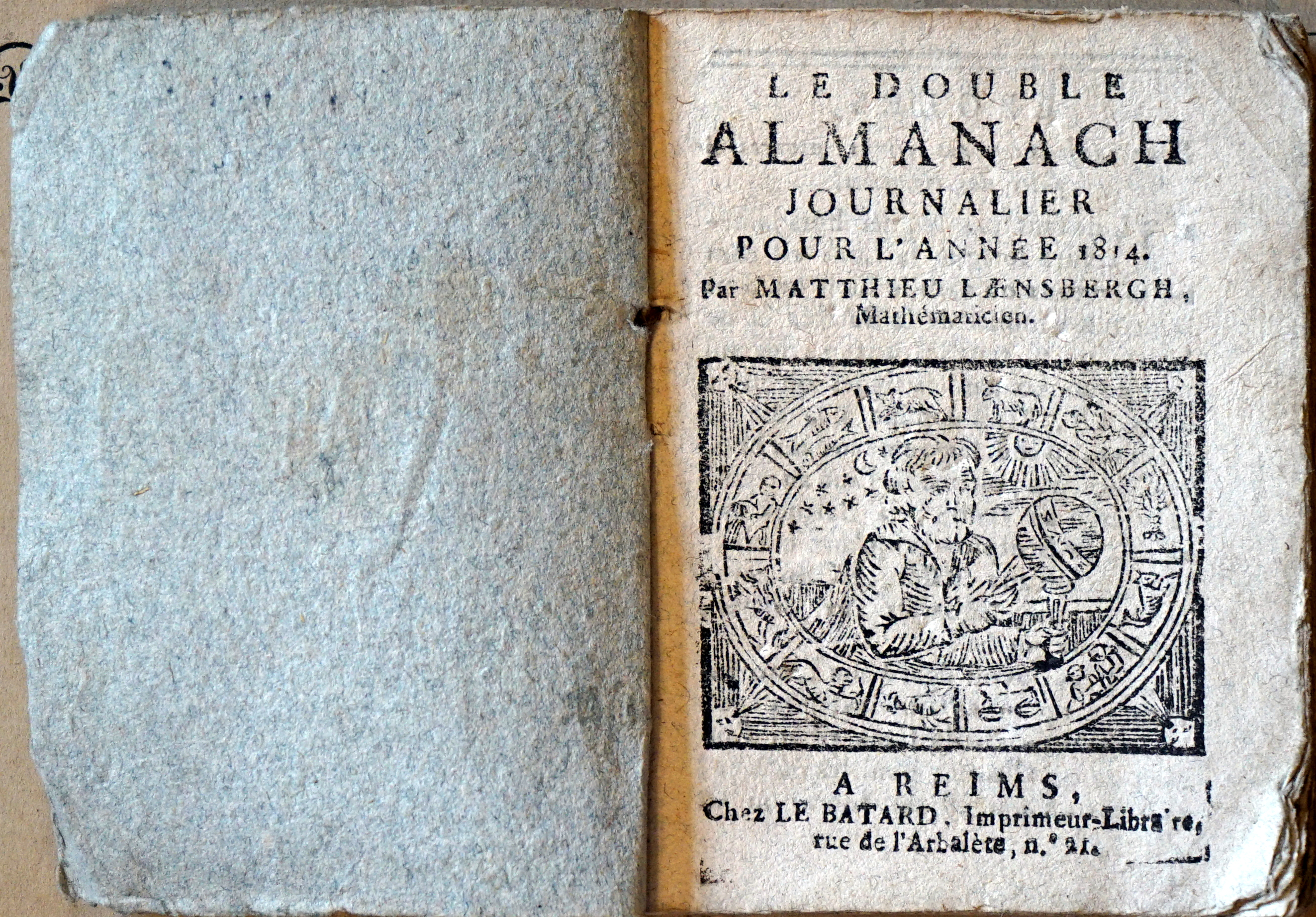 alamanach d e1814